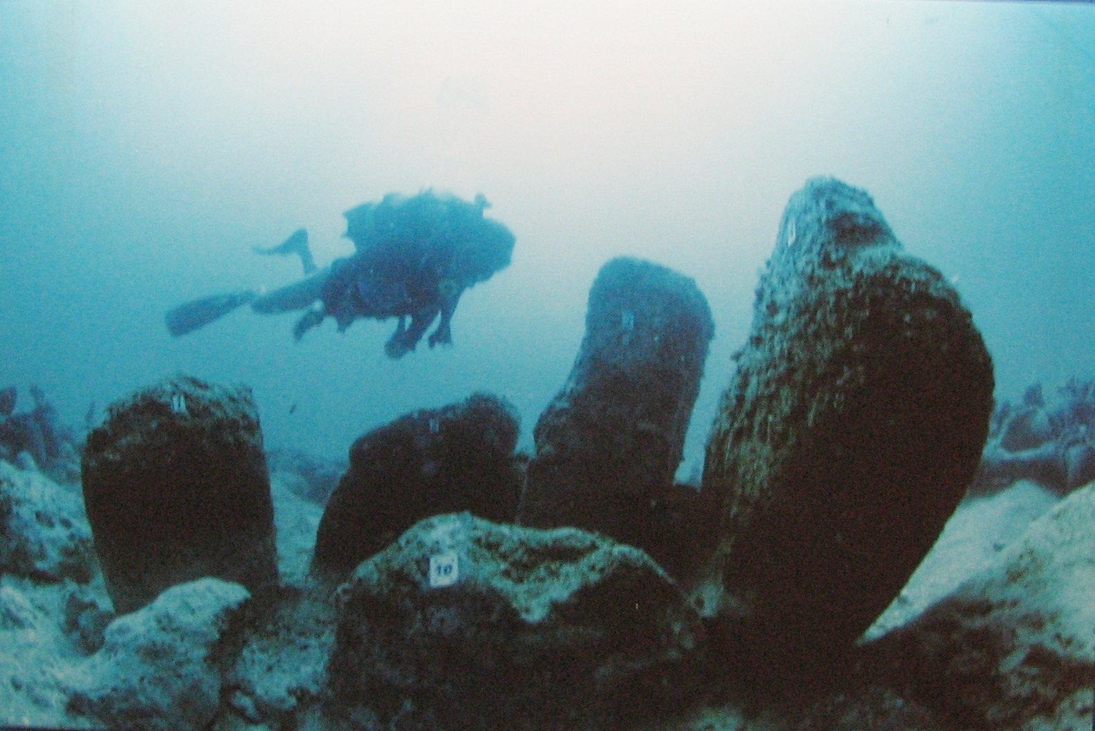 Atlit Yam is an ancient submerged Neolithic village off the coast of Atlit, Israel. The site is dated to the final Pre-Pottery Neolithic B site of Atlit Yam dates between 6900 and 6300 BC. Moshe Stekelis Museum of Prehistory exhibition in Haifa Israel The exhibition is based on the excavations and researches of the Haifa University and Antiquities Authority. Photography by Yosef Galili, Ehud Galili, Itamar Greenberg הכפר הניאוליתי בעתלית-ים שוכן בתוך הים במרחק 400 מטר מקו החוף, מערבית לשפך נחל אורן בעורפו של רכס כורכר טבוע שבהמשכו דרומה נמצא מבצר עתלית הצלבני. האתר נמצא בעומק של 12-8 מטר מתחת לפני הים. האתר מתוארך לסוף התקופה הנאוליתית קדם קרמית ב סוף האלף ה-6 לפנה"ס ממצאים מהאתר מוצגים במוזיאון לפרהיסטוריה ע"ש משה שטקליס בחיפה הנמצא בתוך גן החיות במרכז הכרמל התערוכה מבוססת על חפירות ומחקרים שהתבצעו על ידי אוניברסיטת חיפה ורשות העתיקות הצילומים מהחפירות המוצגים בתערוכה צולמו על ידי יוסקה גלילי, אהוד גלילי ואיתמר גרינברג מבנה פולחני שנמצא באתר